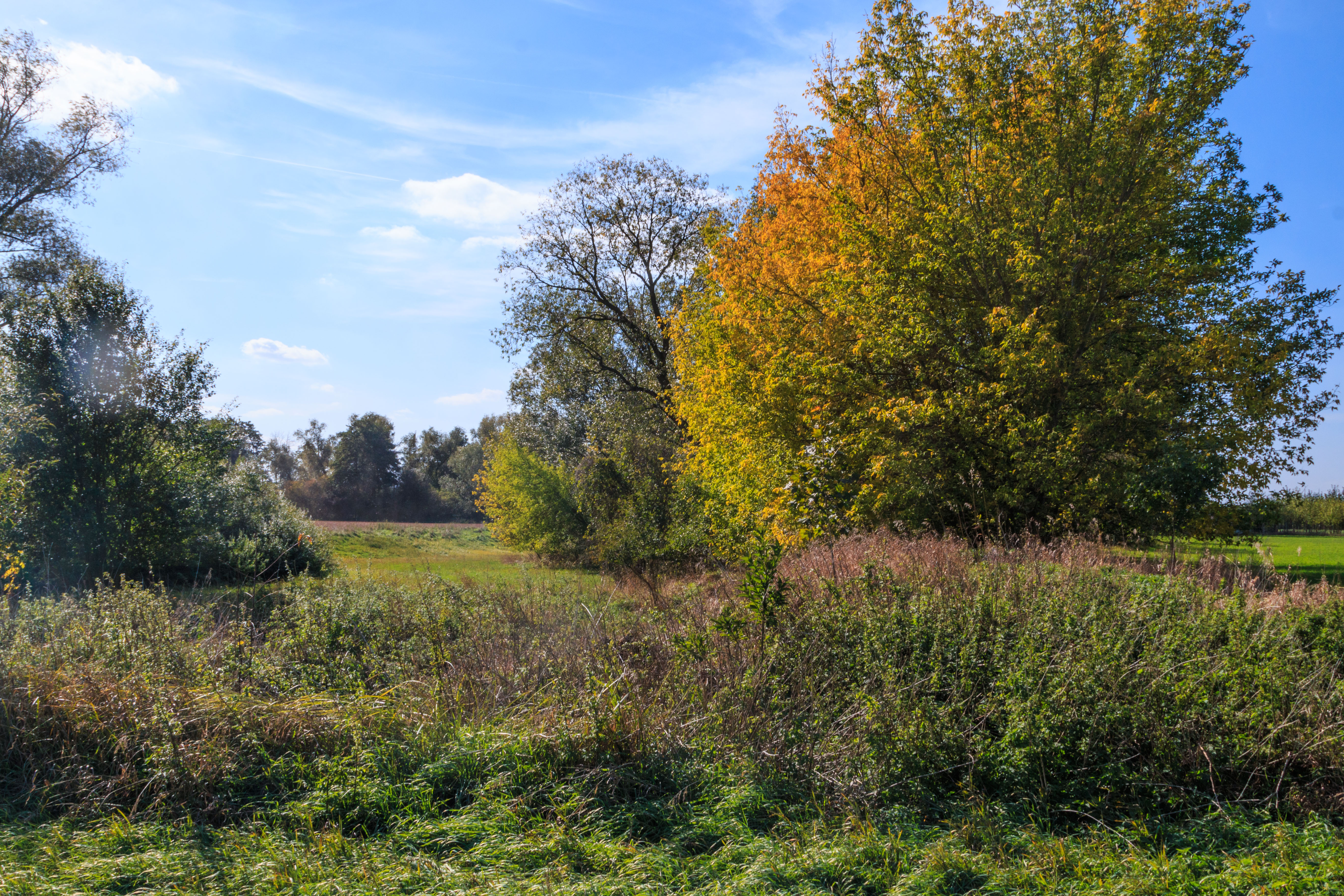 Na Bahnech - mrtvé rameno Labe u Labětína Project: Vodstvo